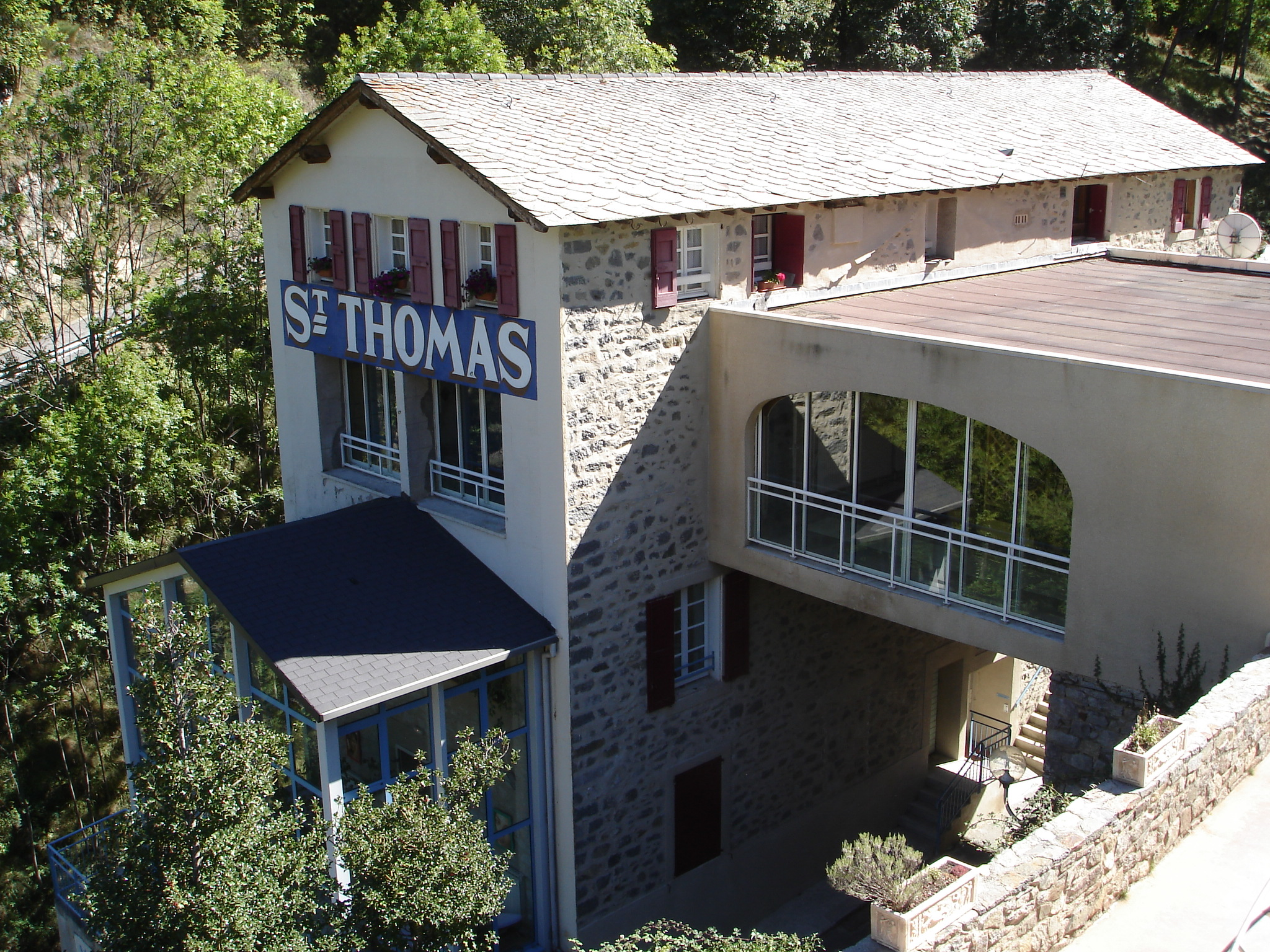 66360 Fontpédrouse, France